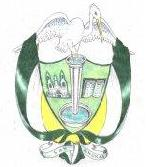 El perímetro del escudo es de forma suiza. en la parte inferior emerge una fuente de agua y en la parte superior posa una garza con su dos alas desplegadas. A lado drecho de la fuente está dibujado el frontis del templo parroquial, y al izquierdo, a la misma altura, un librom abierto. Adorna el escudo la bandera verde, blanca y amrilla que descuelga de la punta de las alas de la garza, y a la vez sostiene el escudo. La bandera va recogida hacia el vértice del escudo, donde se entrelaza una cinta de color blanco en la cual va escrito en letras negras mayúsculas el nombre del municipio: San Andrés. El escudo "simboliza la esperanza, leactad, constancia y vigor de la naturaleza y de las gentes", su religiosidad, estudio y sabiduría. La garza es emblema de conciliación y de paz. La fuente sinifica vida, pureza y convivencia.